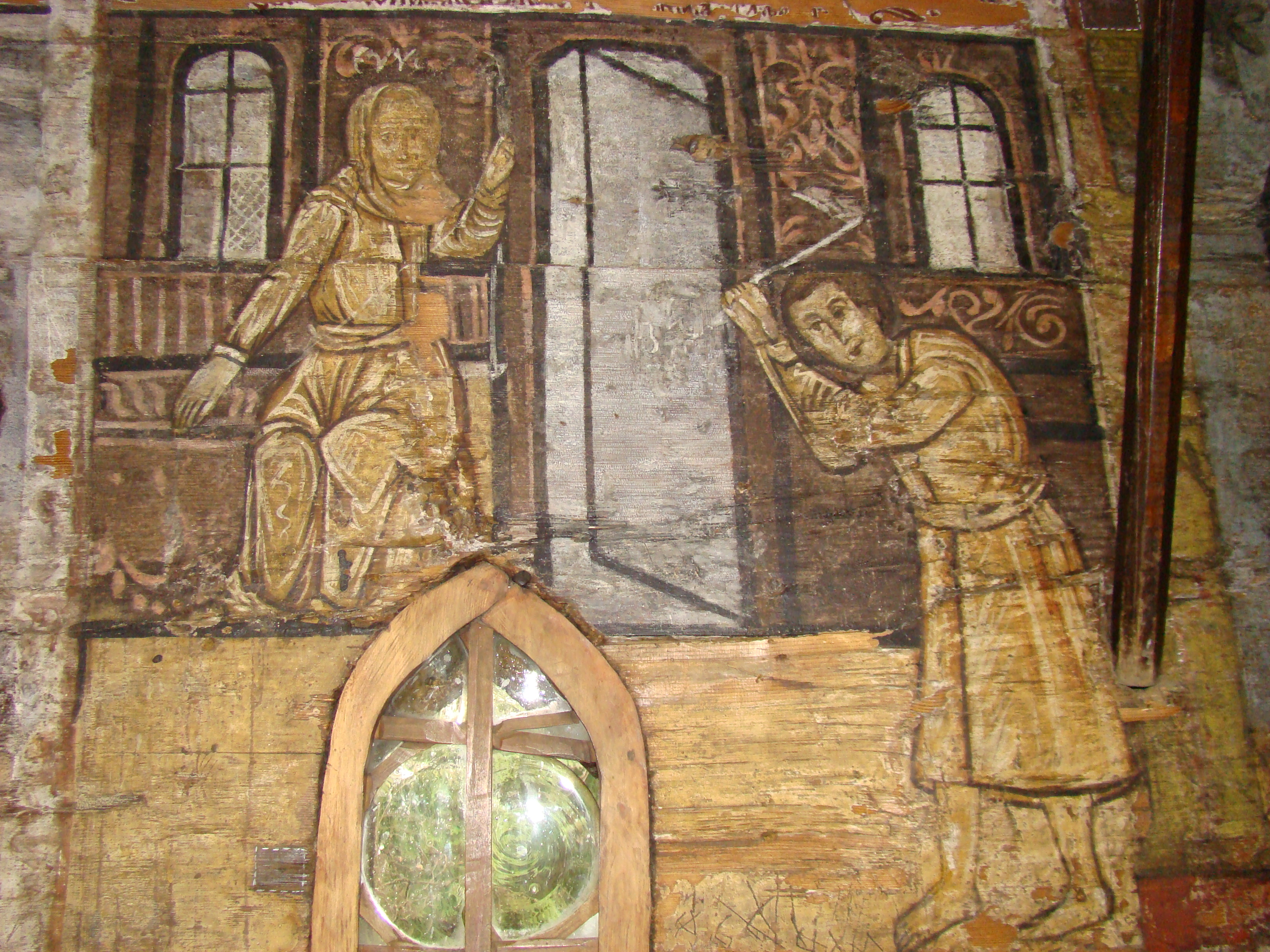 Biserica de lemn din Budești-Josani, județul Maramureș